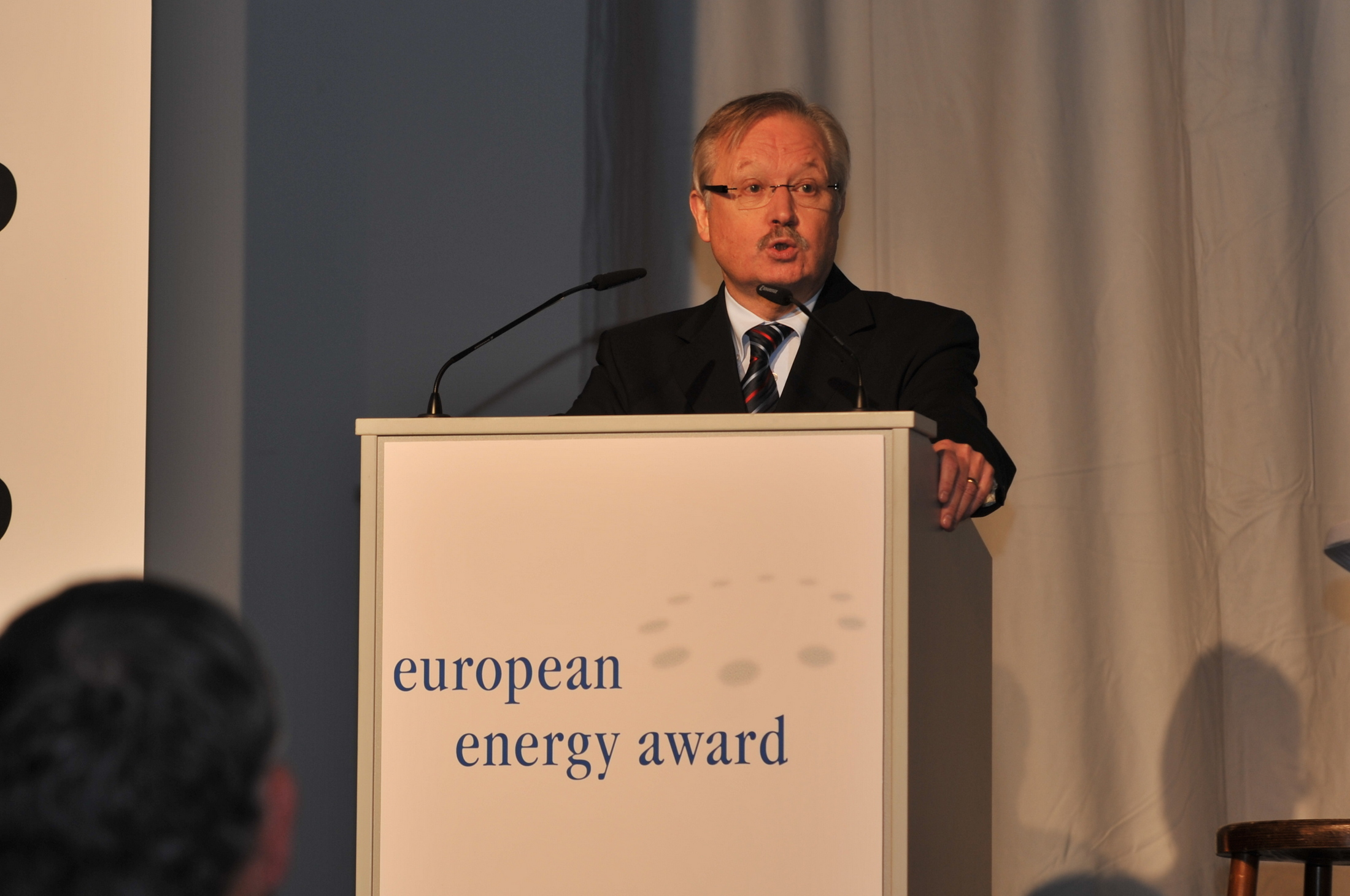 European Energy Award 2012 Oberbürgermeister Oberhausen Herr Klaus Wehling. Flickr tags: LVR-Industriemuseum; Oberhausen; Verleihung; European Energy Award; EnergieAgentur.NRW; Kommunen; Landkreise; Klimaschutz; Johannes Remmel